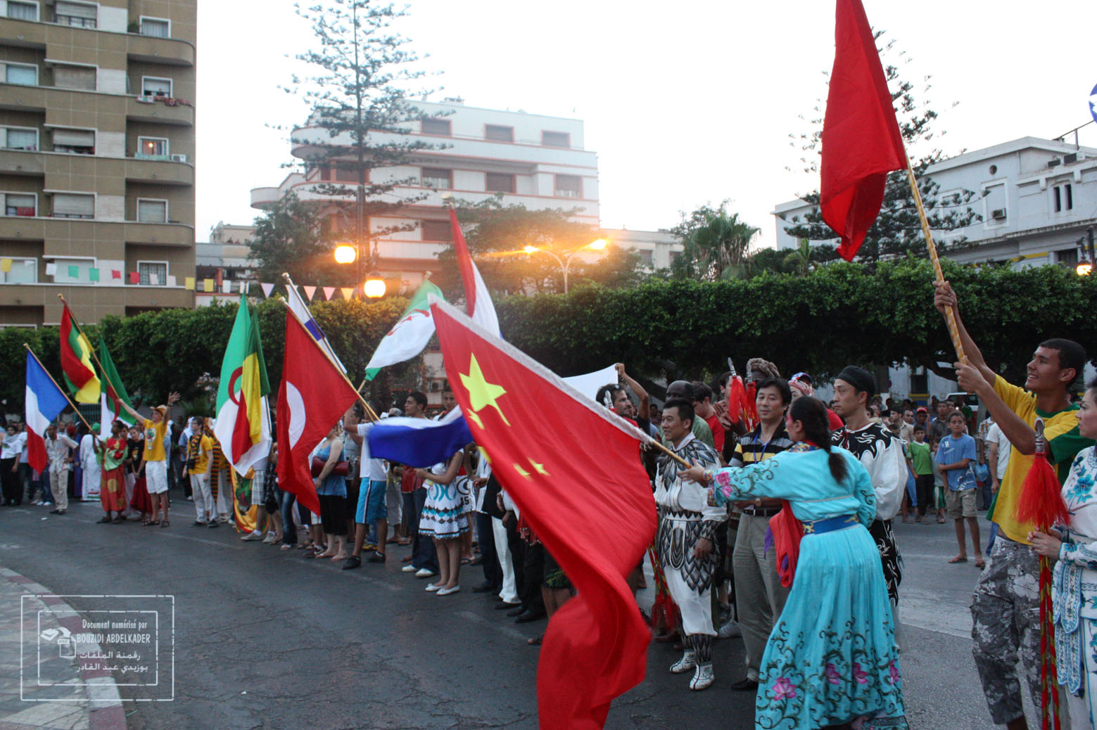 cérémonie d'ouverture du festival national théatre amateur de mostaganem 43 édition international avec la participation de plusieurs troupes étrangère - chine - France - Belgique - Croatie - Tunisie - etc